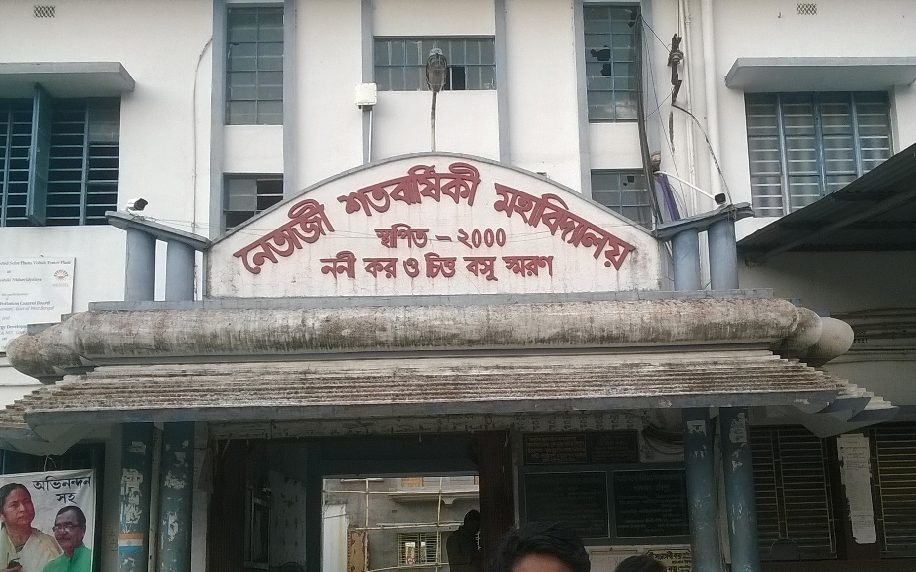 নেতাজী শতবার্ষীকি মহাবিদ্যালয় , হরিপুর , হাবরা